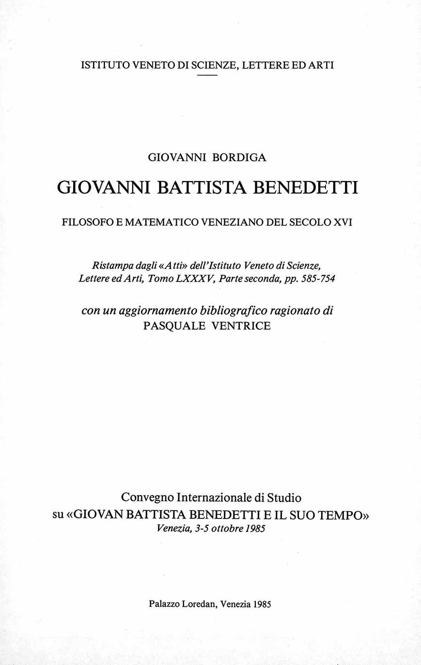 Giovanni Battista Benedetti : filosofo e matematico veneziano del secolo 16. : ristampa dagli Atti dell'Istituto veneto di scienze, lettere ed arti, Tomo LXXXV, parte seconda, pp. 585-754 / Giovanni Bordiga ; con un aggiornamento bibliografico ragionato di Pasquale Ventrice. - Venezia : Istituto veneto di scienze lettere ed arti, [1985]. - VII, 586-754, 172-207 p. ; 24 cm .